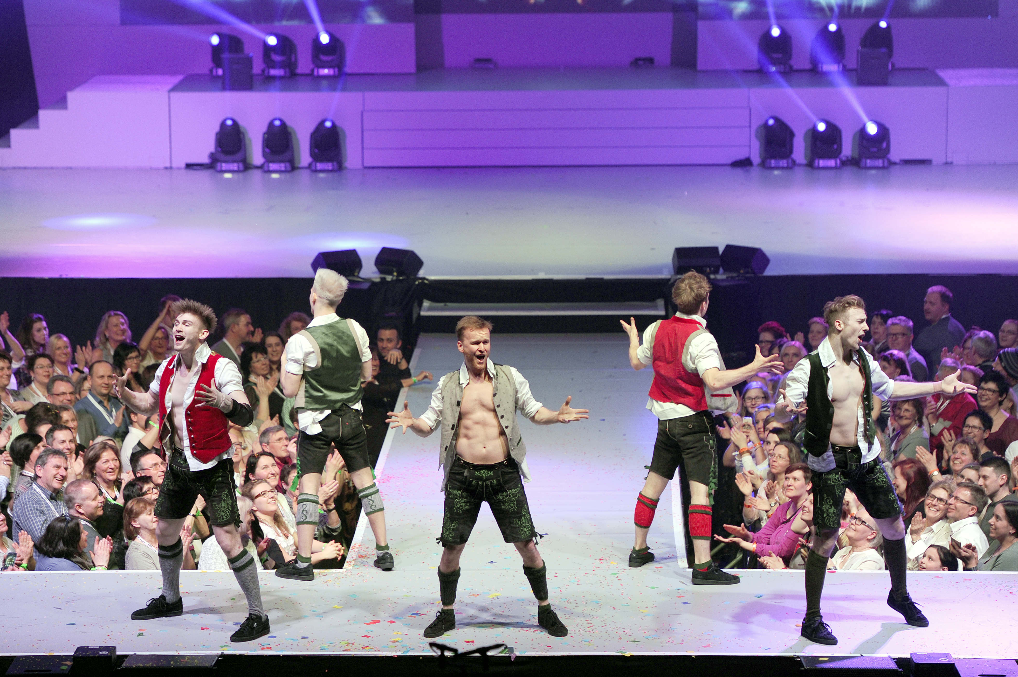 DDC mit Breakdance in Lederhosen